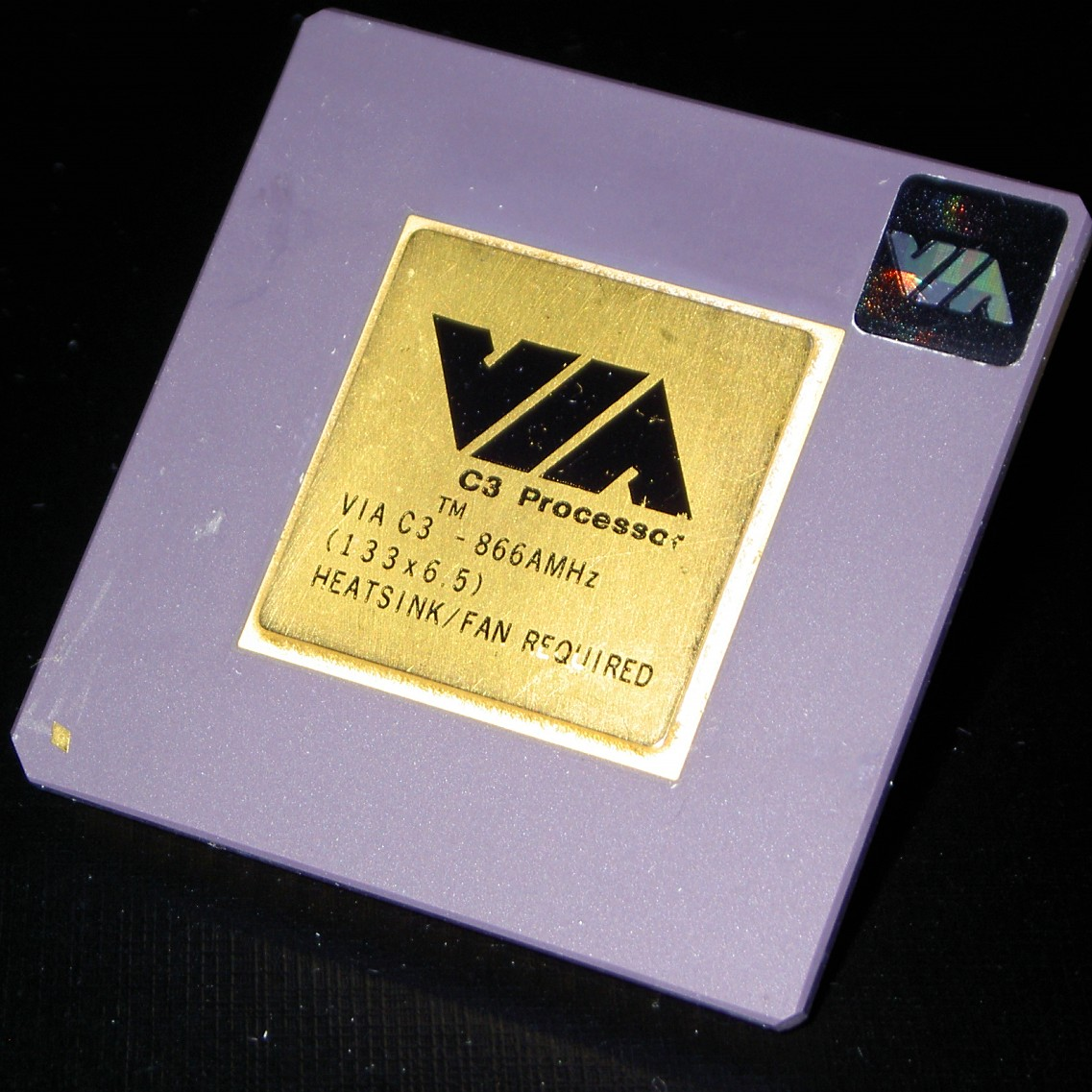 "VIA C3 Processer 866AMHz (C5C/Ezra)"